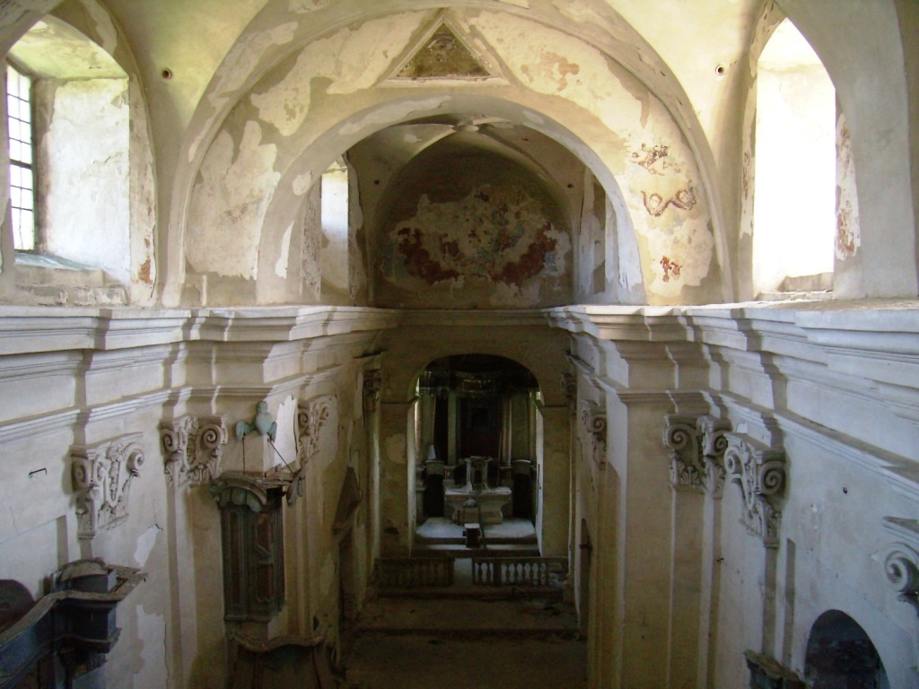 Костел, Сидорів